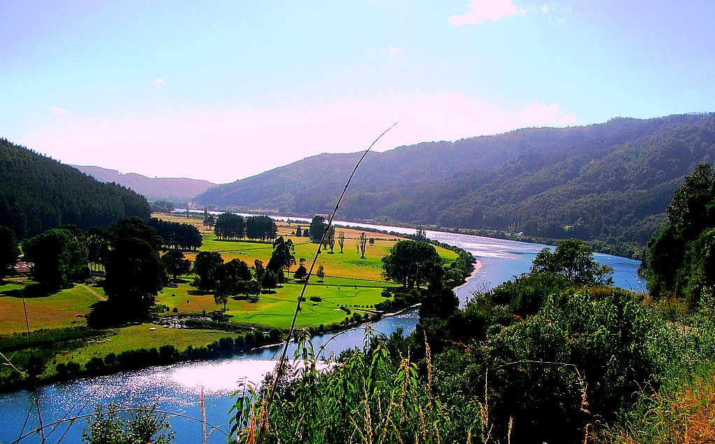 Río Calle-Calle visto desde el mirador del camino a Los Lagos. La foto esta tomada viendo aguas arriba desde la ribera sur. A la izquierda se ve el sector Quita Calzón (ribera norte) y a la derecha (ribera sur) el sector Huellelhue.